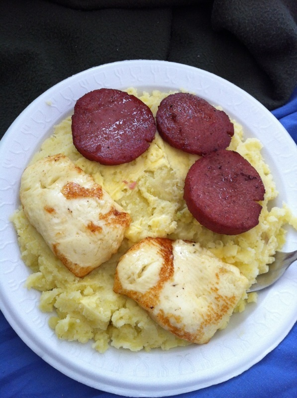 Mangu dominicano Contenido: Lonjas de salami fritas Lonjas de queso blanco Mangu o puré de plátano verde Mantequilla Este es un plato típico en el desayuno dominicano República Dominicana